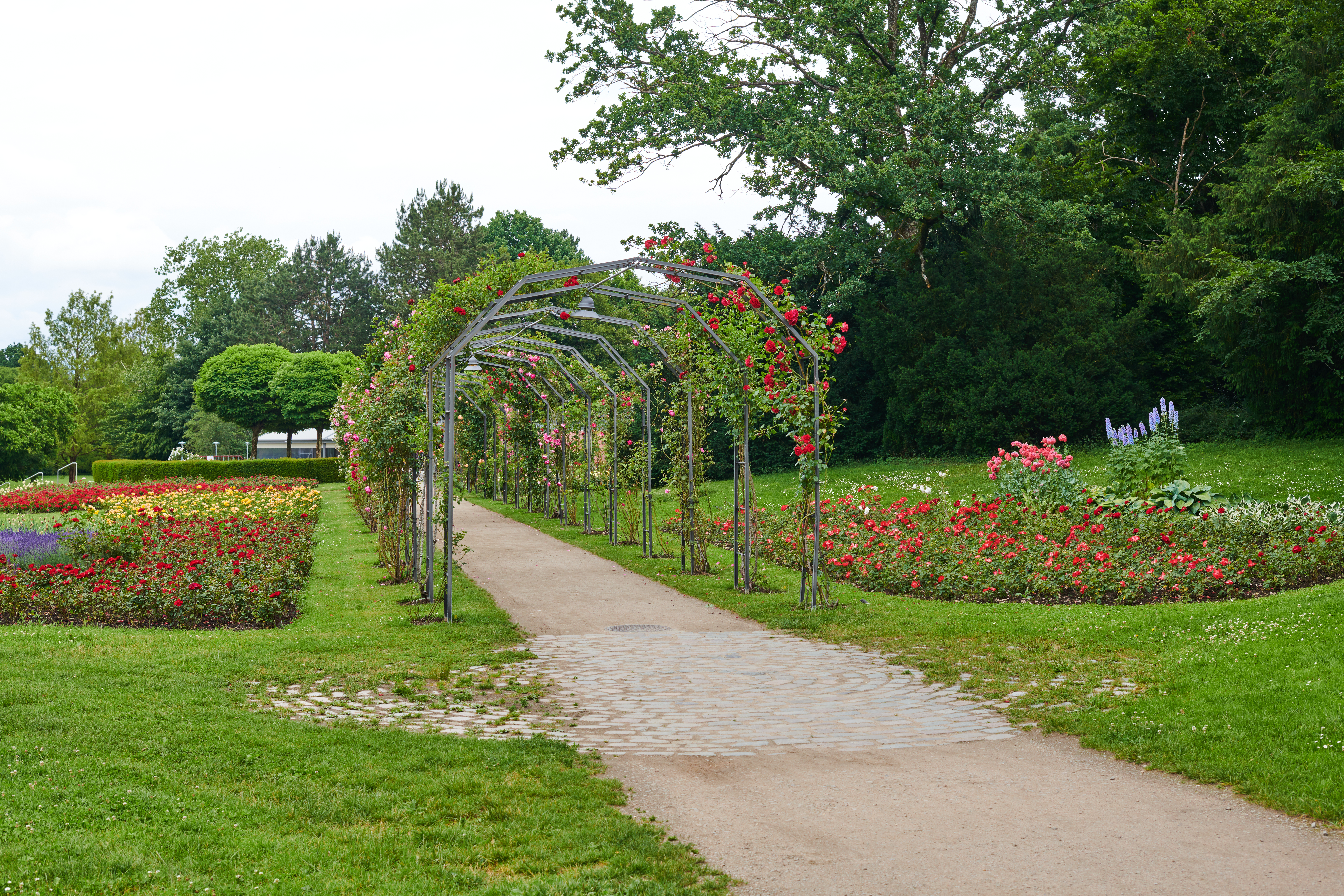 Landschaftspark Grütt Lörrach: Rosarium